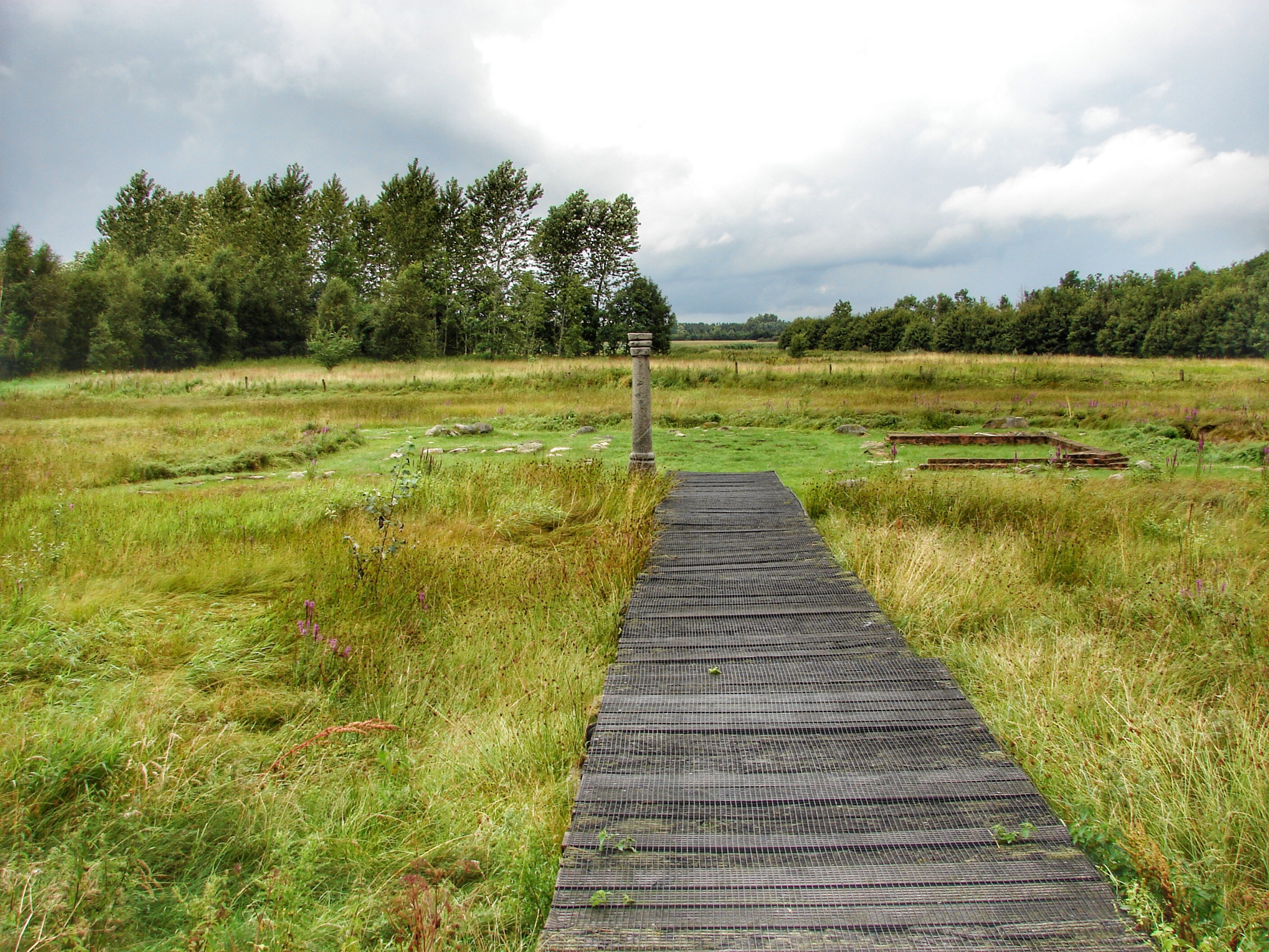 Ruiner af Hertug Hans' (1521-1580) lystslot Lusthus Thom Gronenhagen (Grøngård Slot), ved Tønder, Sønderjylland